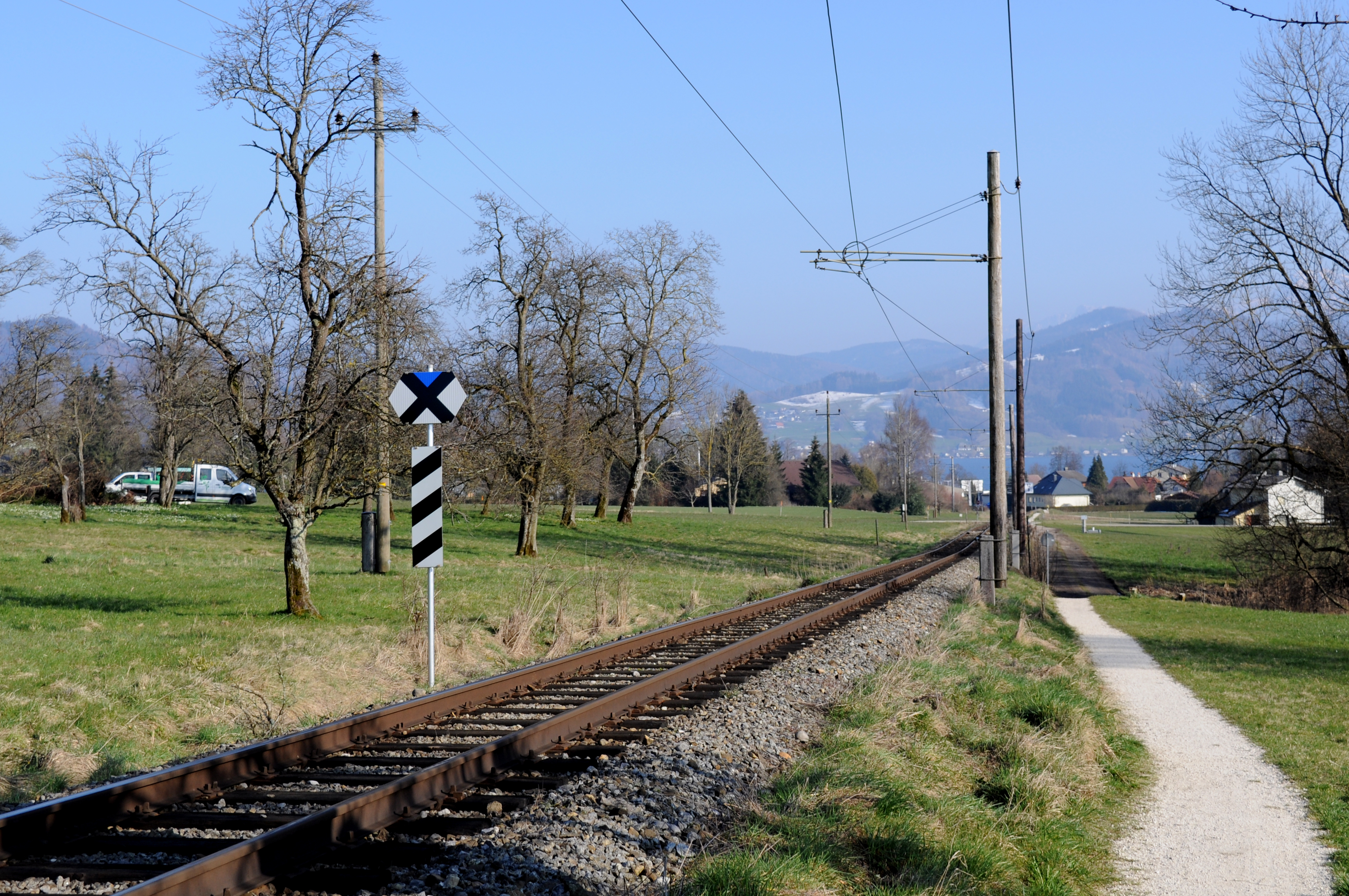 Kreuztafel des Bhf. Attersee an der Attergaubahn